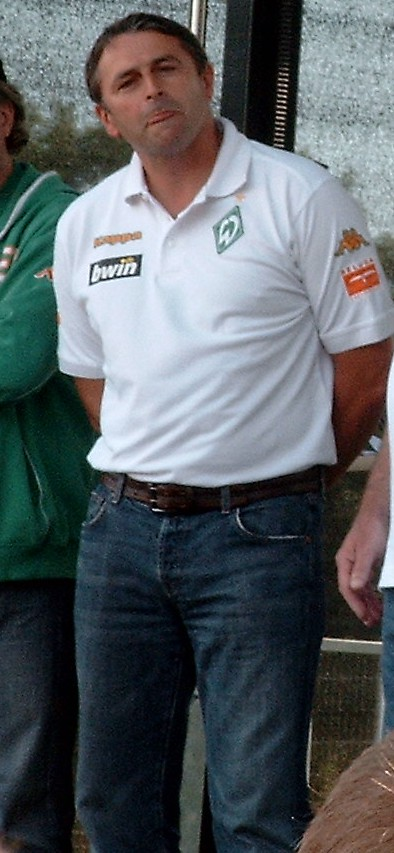 Klaus Allofs am Tag der Fans 2006